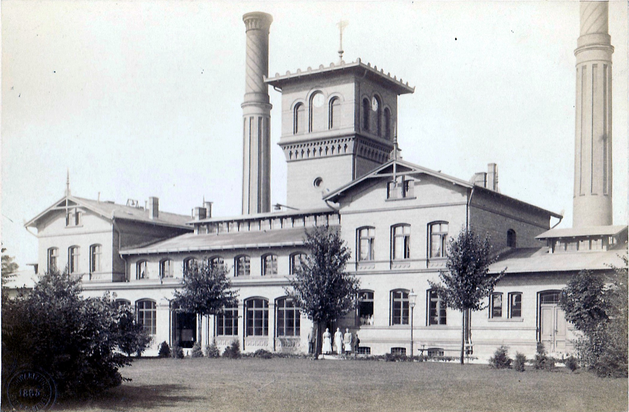 Irrenanstalt der Stadt Berlin zu Dalldorf, das Küchenhaus, im Hintergrund der Wasserturm sowie die Schornsteine des Kesselhauses, Friedrich Albert Schwartz, 1885